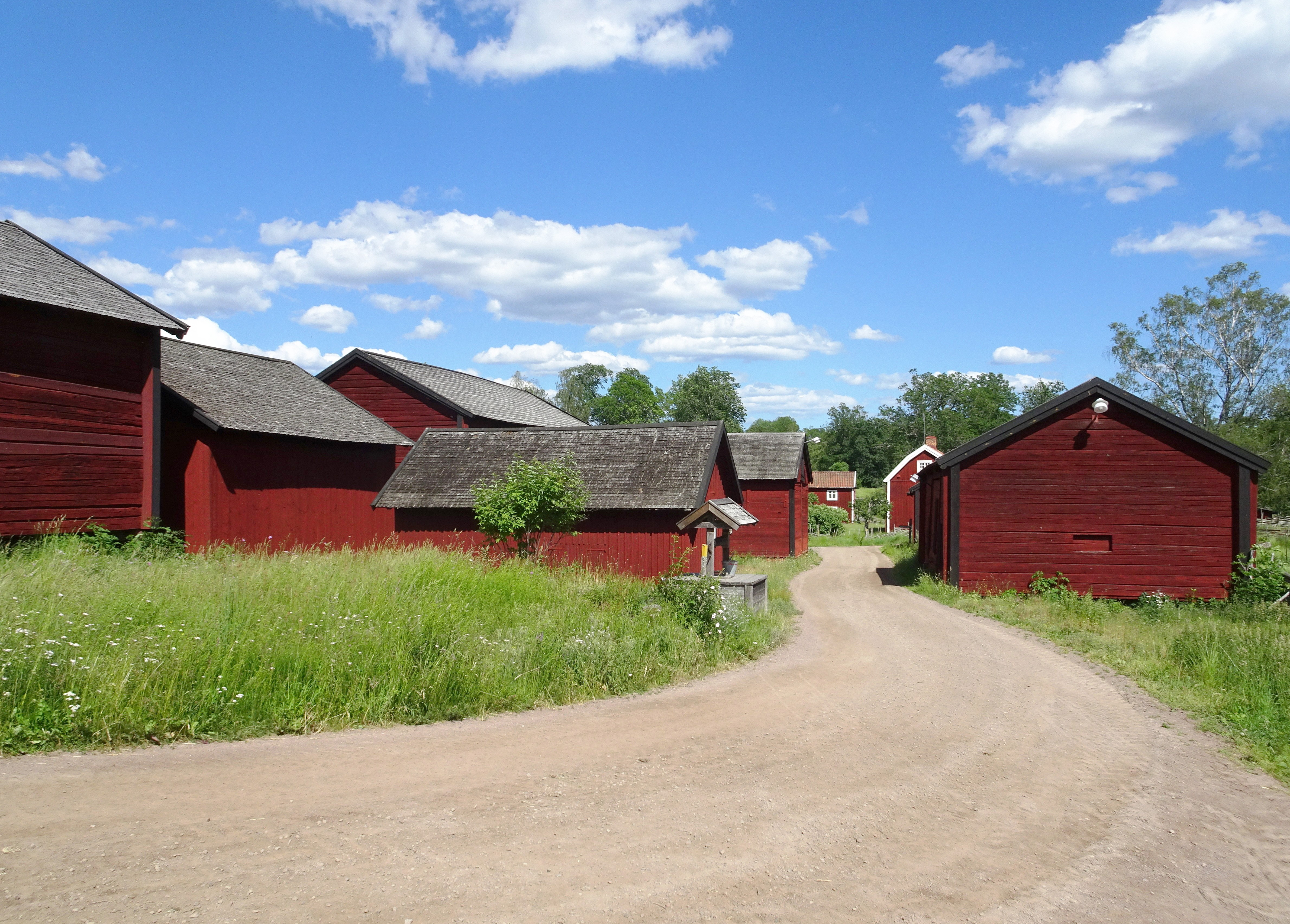 Stensjö by